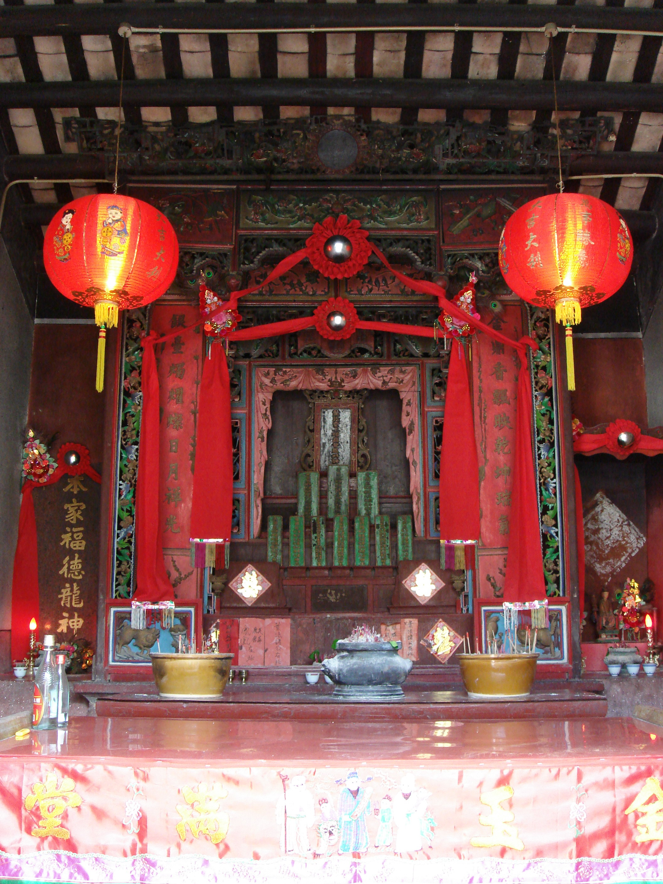 中文（香港）: 蓮麻坑葉氏宗祠。